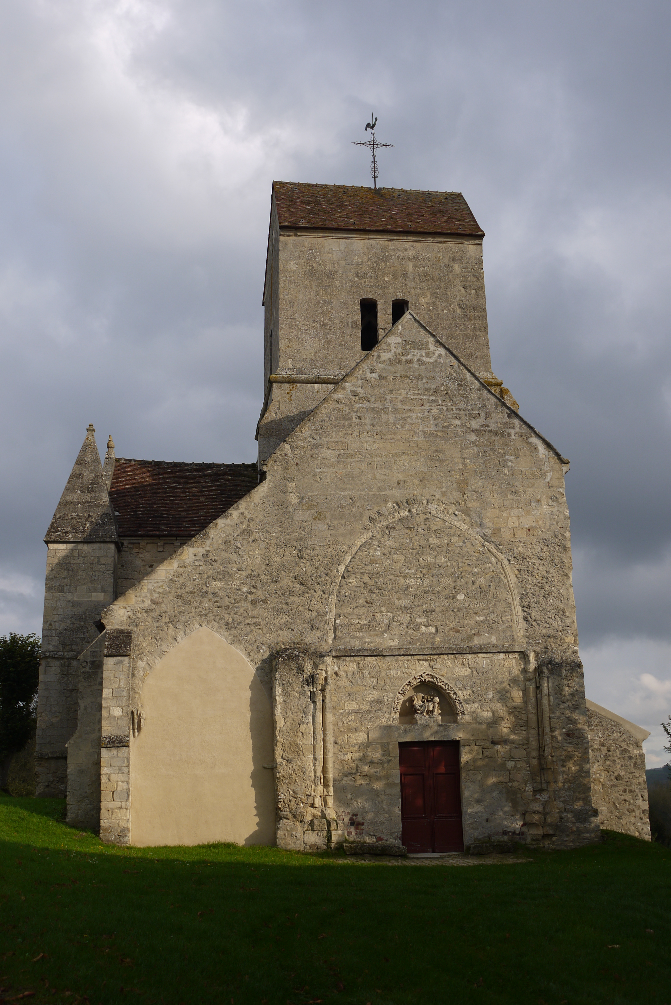 Église Saint-Crépin de Brumetz